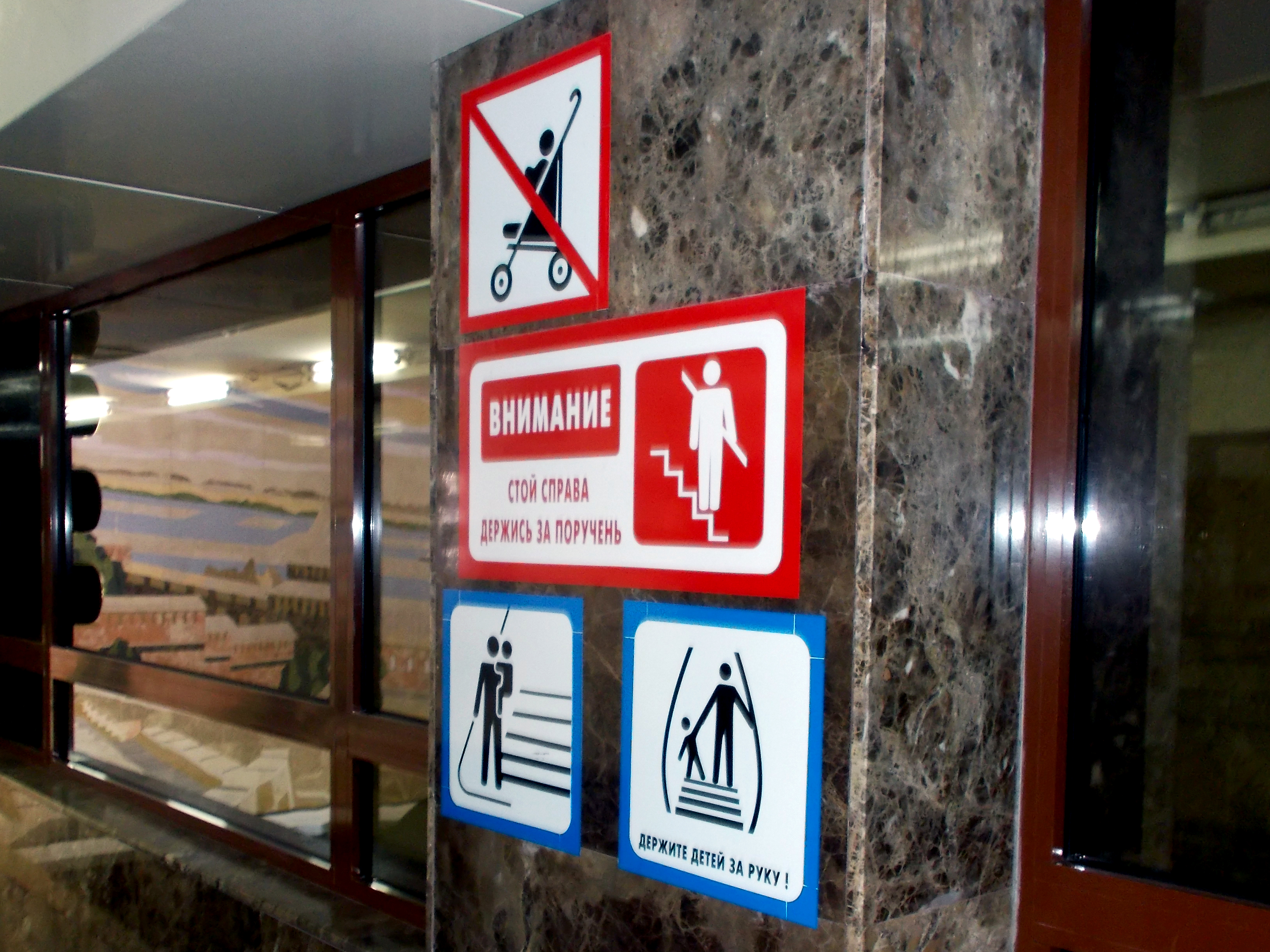 Таблички на станции «Горьковская» Нижегородского метро